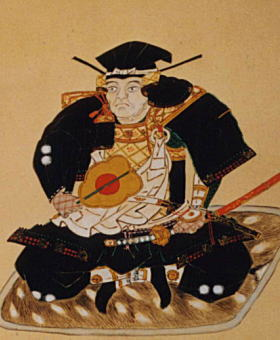 池田恒興画像（林原美術館蔵）